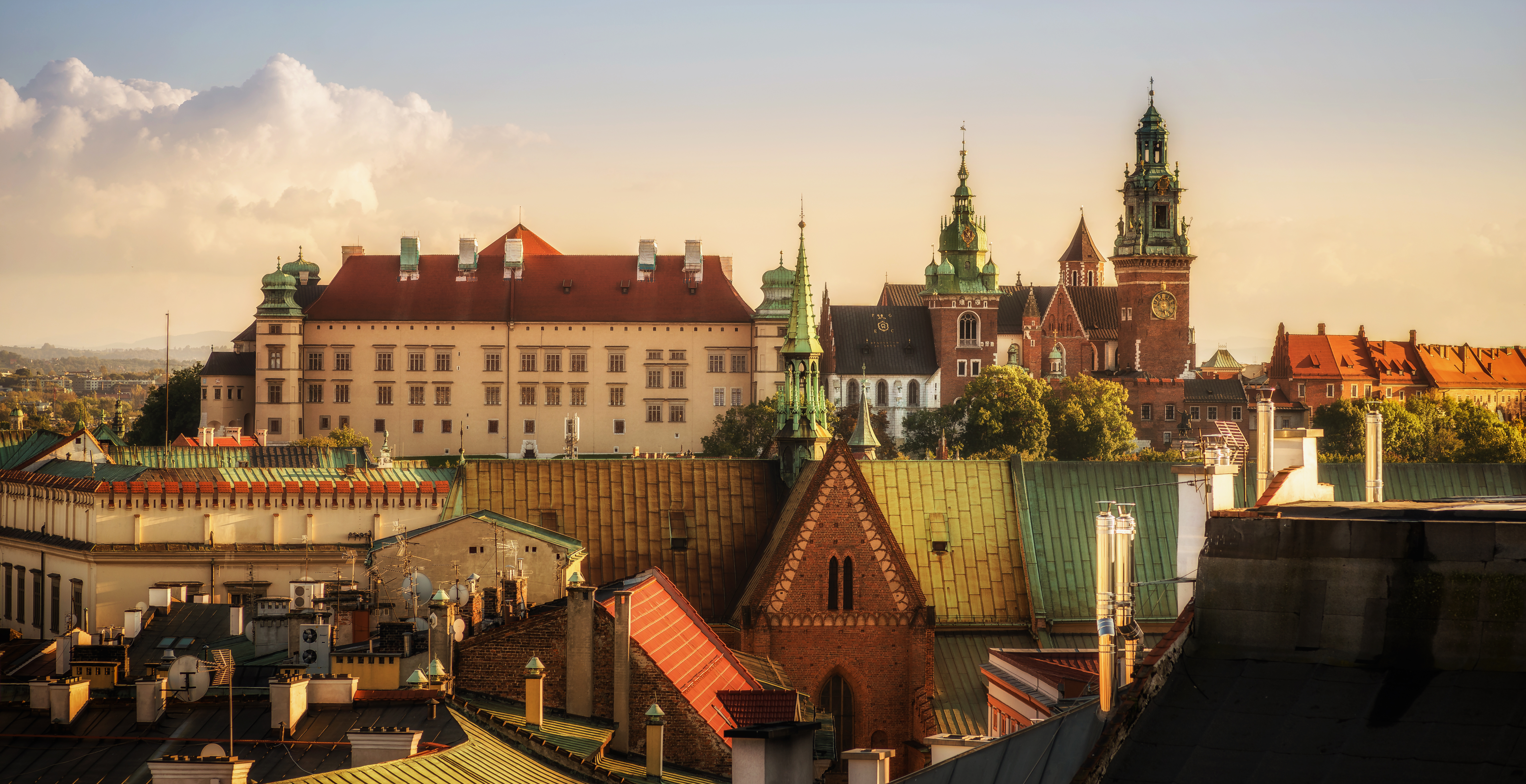 Kraków, zespół Wzgórza Wawelskiego